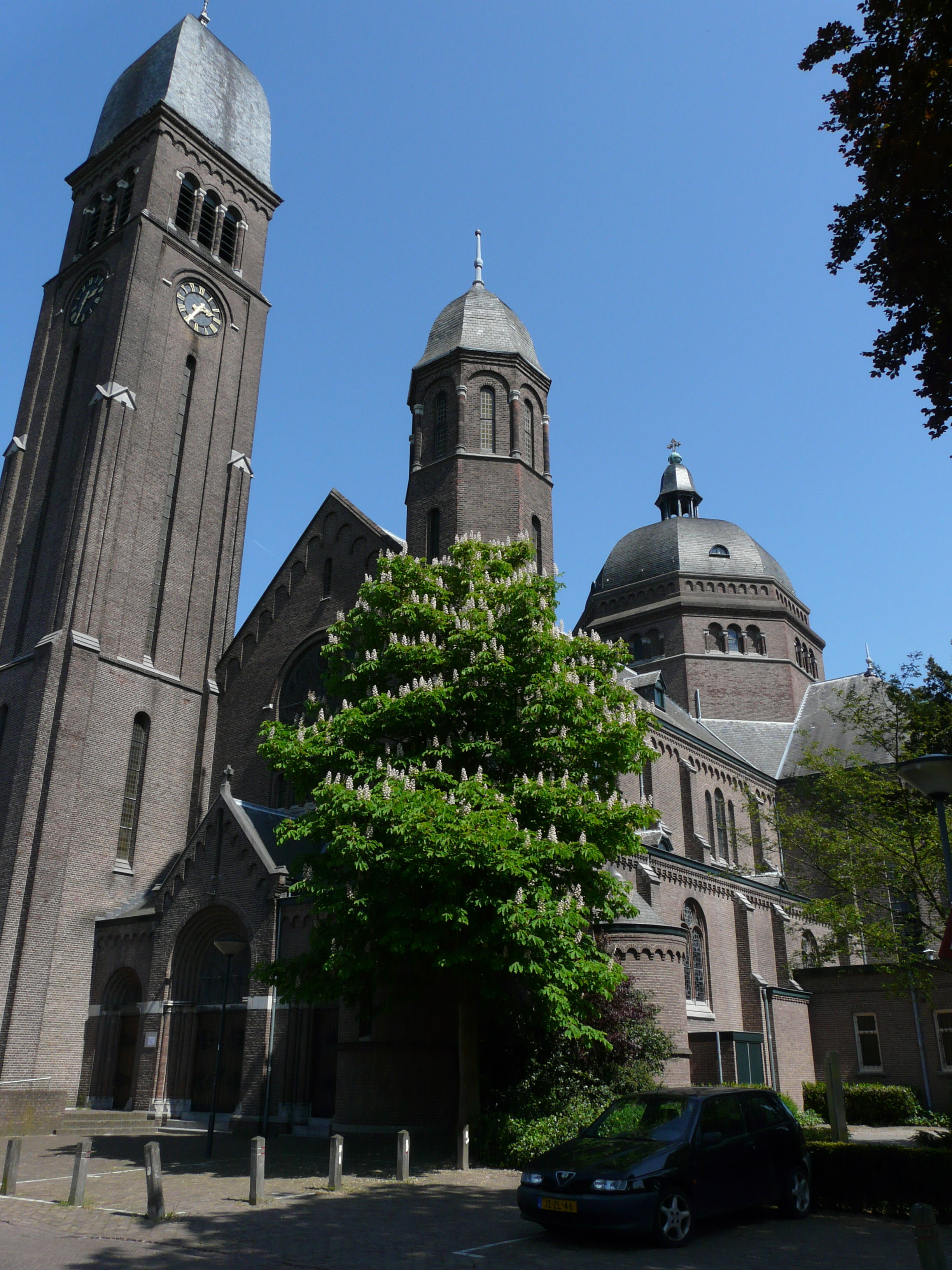 Onze-Lieve-Vrouwekerk in Helmond